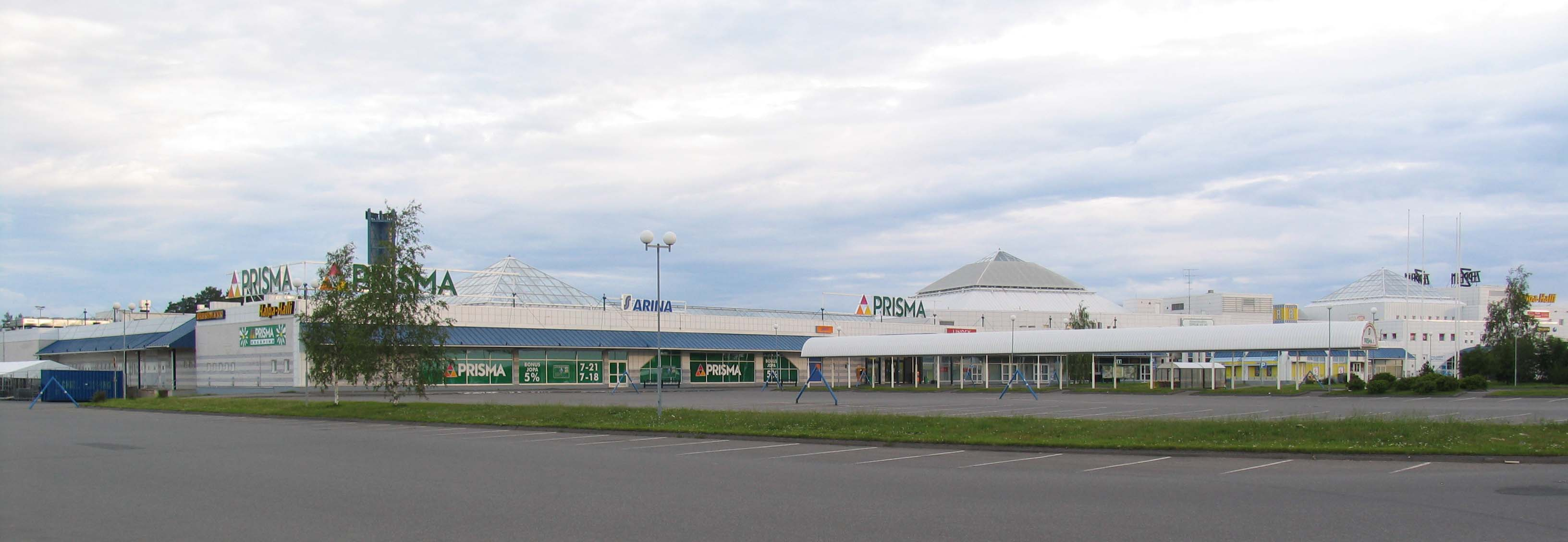 Eteläkeskus Zeppelin in Kempele, Finland